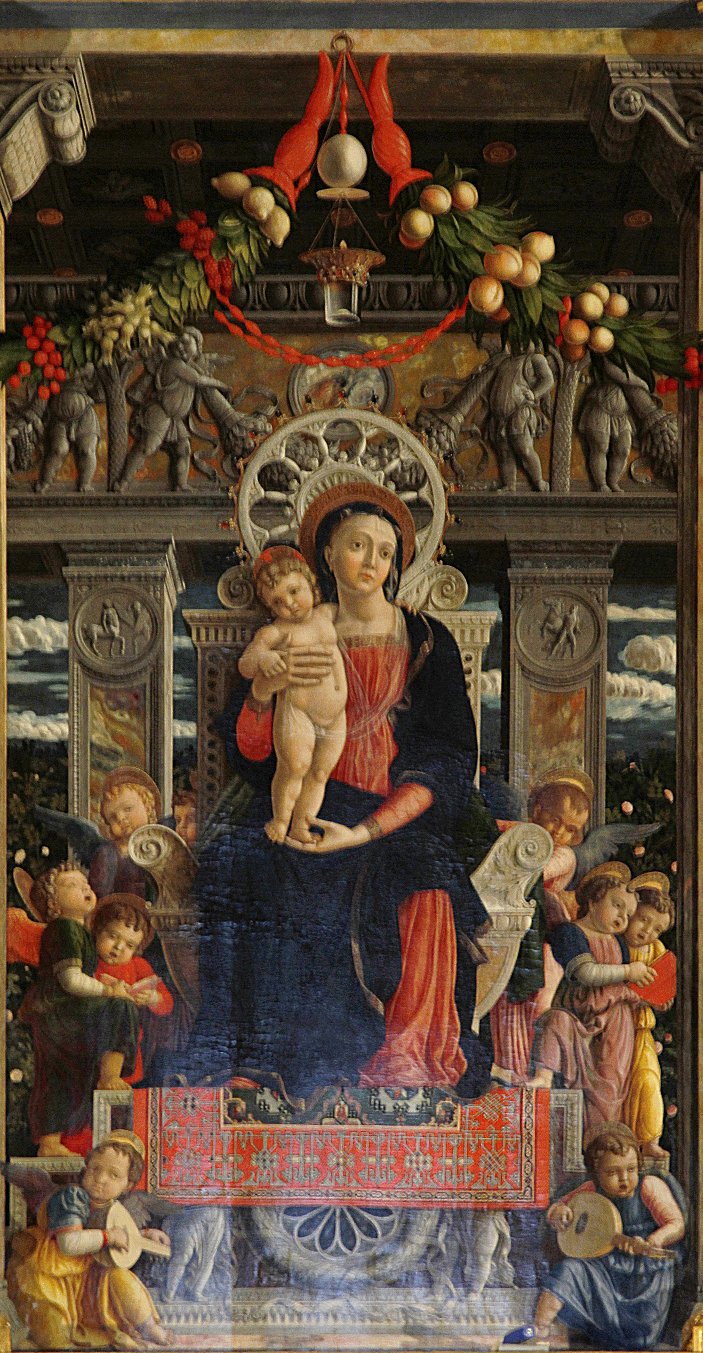 Pala di San Zeno by Andrea Mantegna - San Zeno - Verona